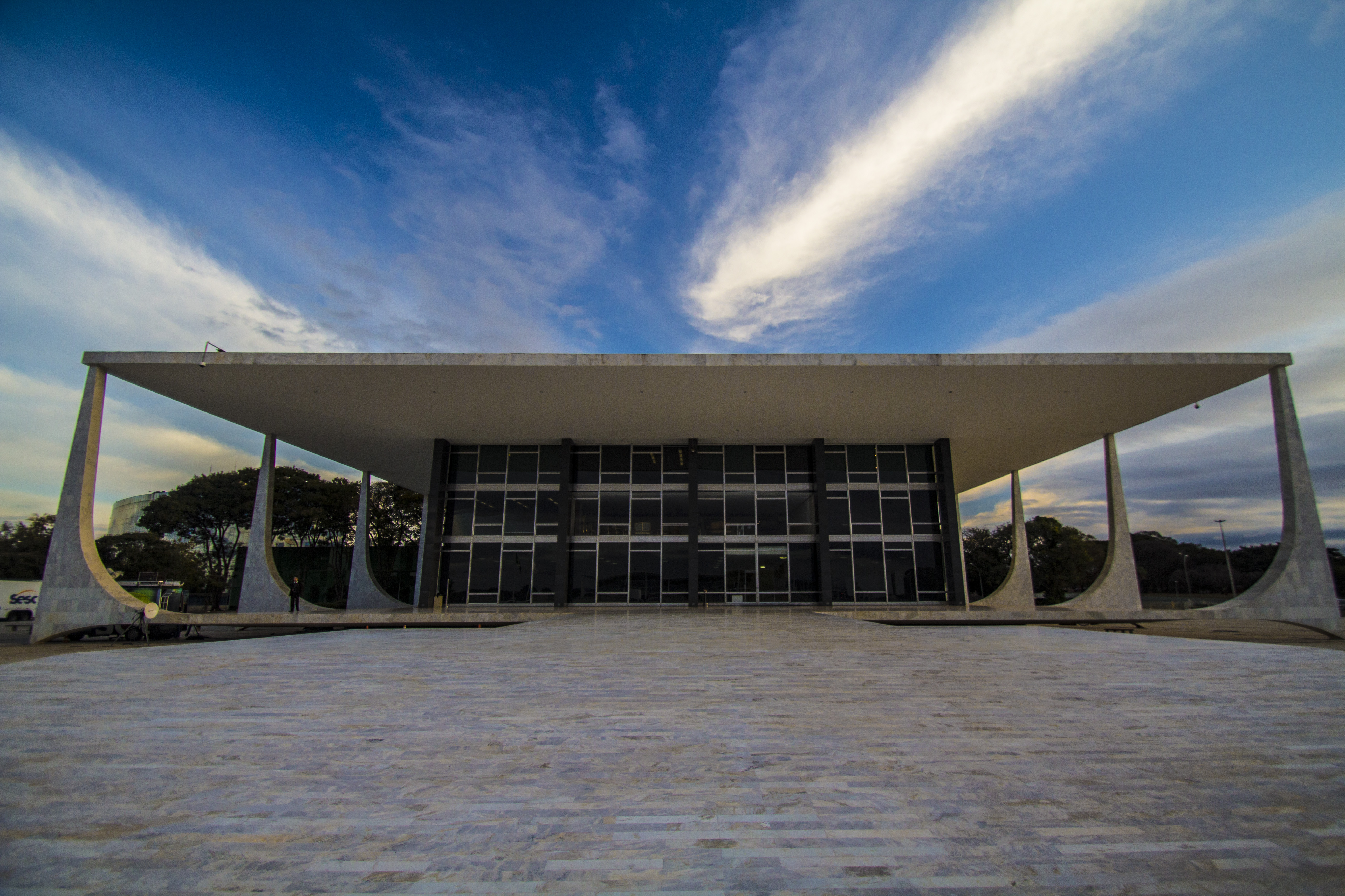 Conjunto urbanístico de Brasília construído em decorrência do Plano Piloto traçado para a cidade